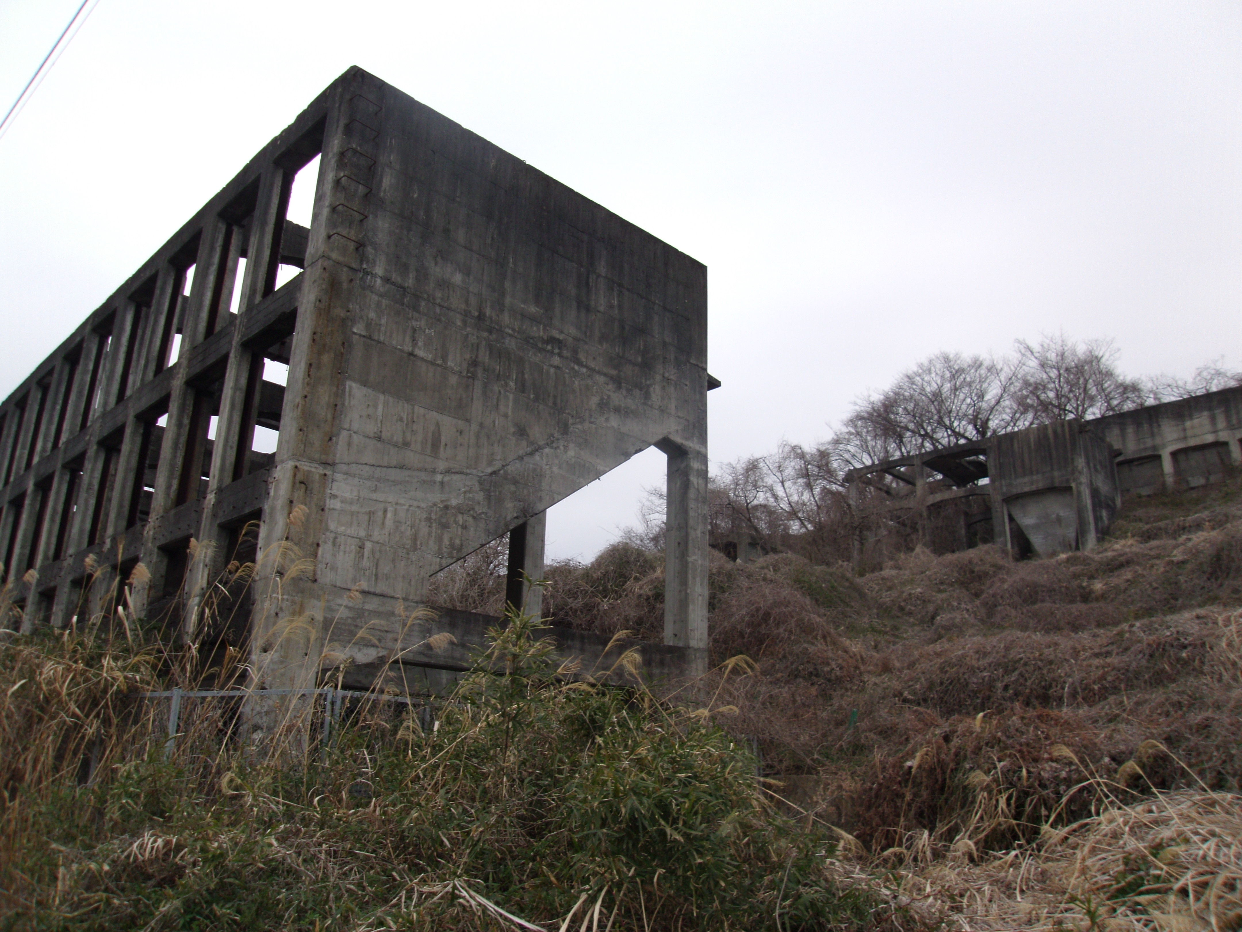 常磐炭鉱中郷鉱跡（茨城県北茨城市）。右上は旧洗炭場で、近代になり江戸時代に造られた灌漑水路の十石堀から分水して工業用水として石炭に付着した泥を洗い流していた。